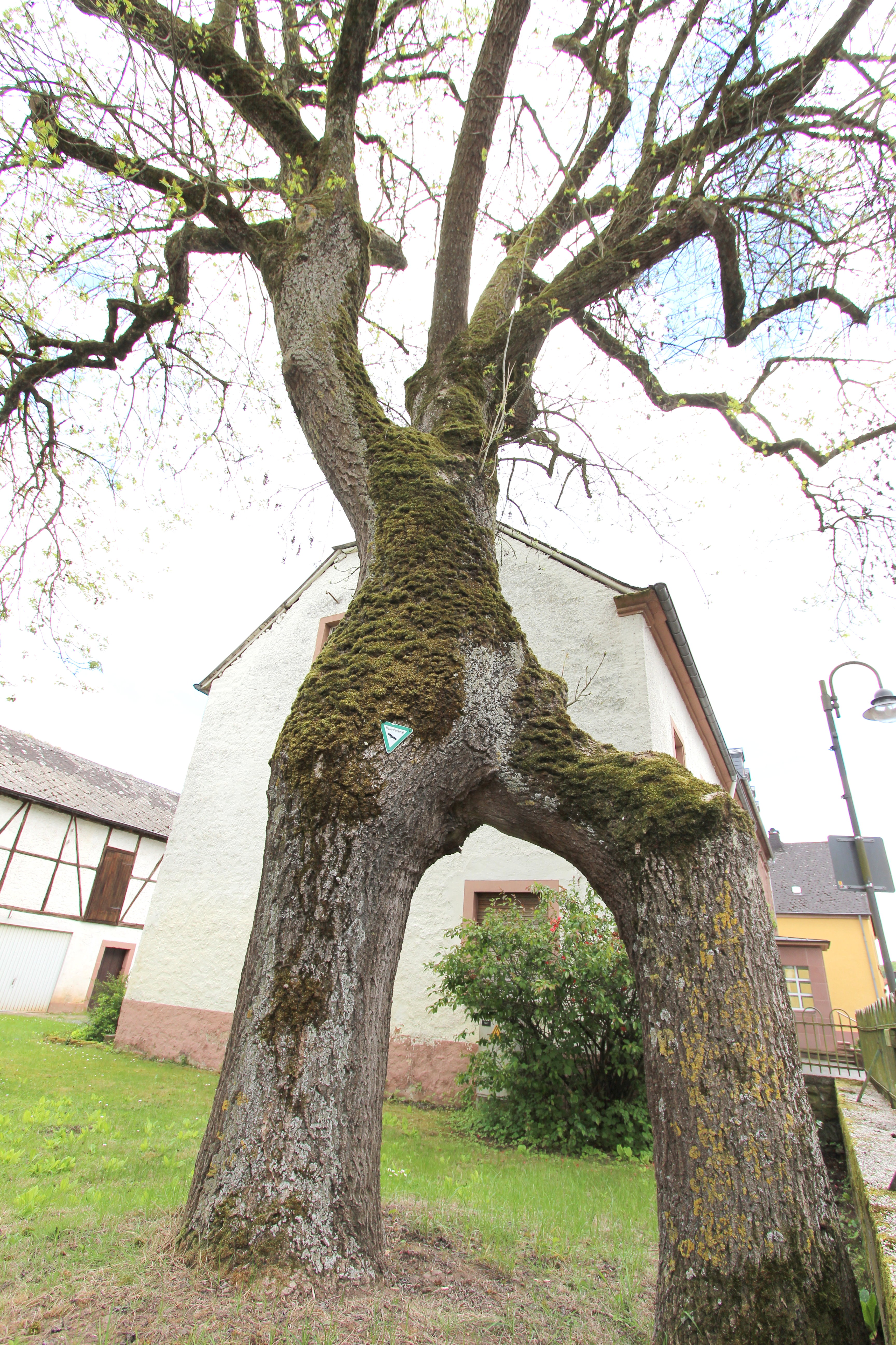 54675 Mettendorf, Im Fronhof 6. Doppelesche aus zwei zu einem Stamm zusammengewachsenen Esche neben Im Fronhof 6. Der Baum wurde am 01.02.1978 in die Naturdenkmal-Liste aufgenommen. Bildaufnahme von 2017.